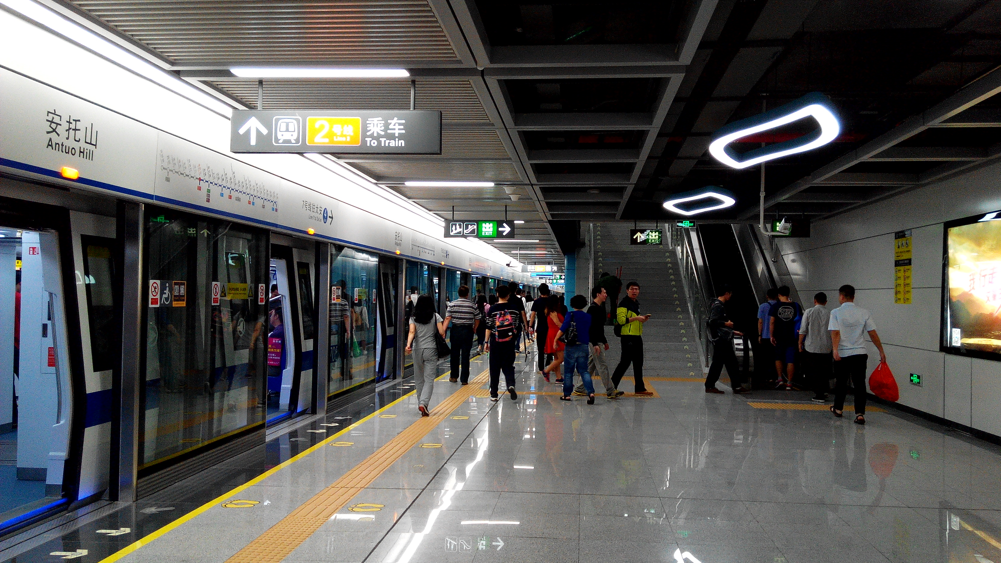 深圳地铁7号线 安托山站4号站台